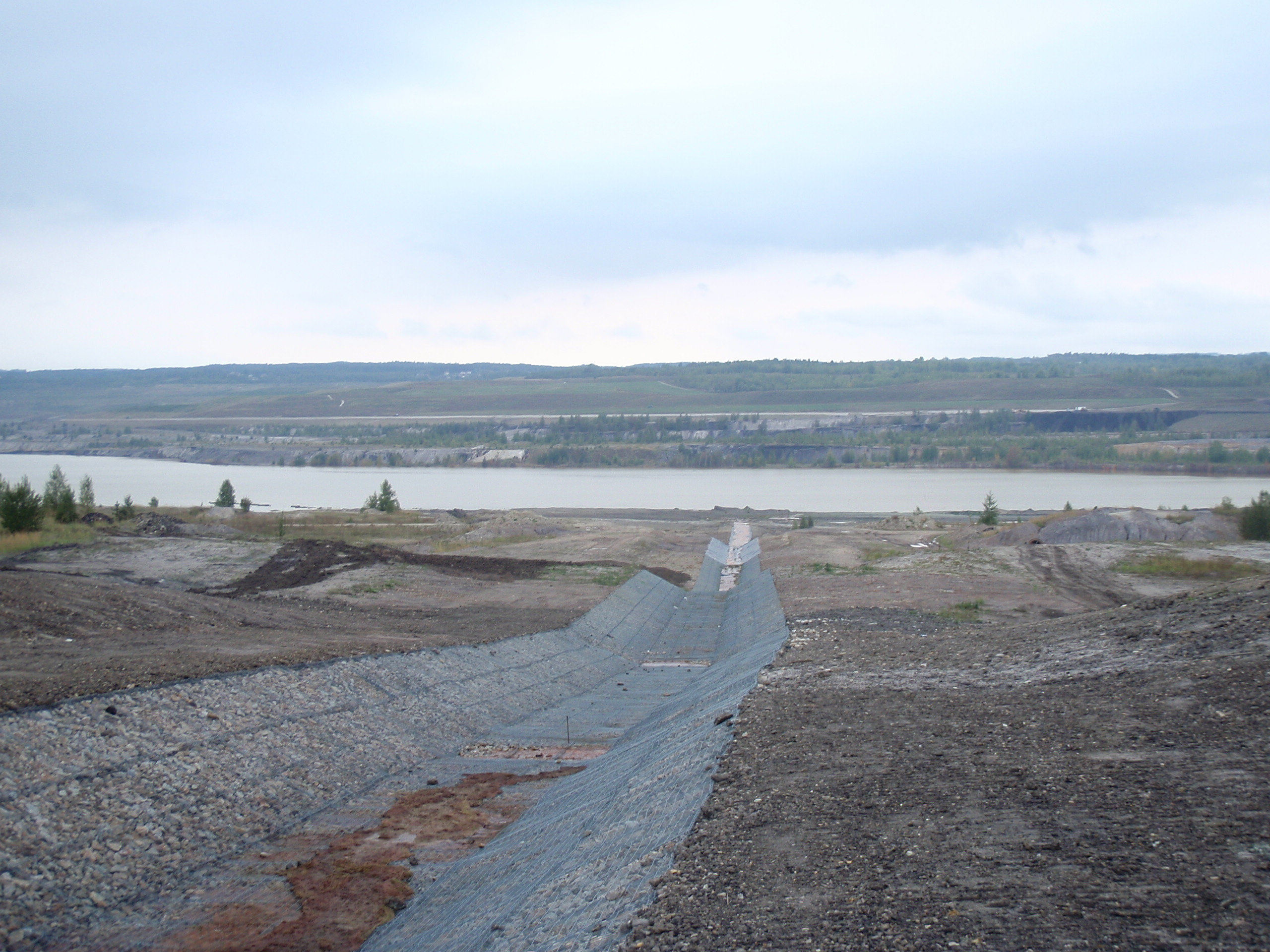 Výstavba napouštěcího koryta